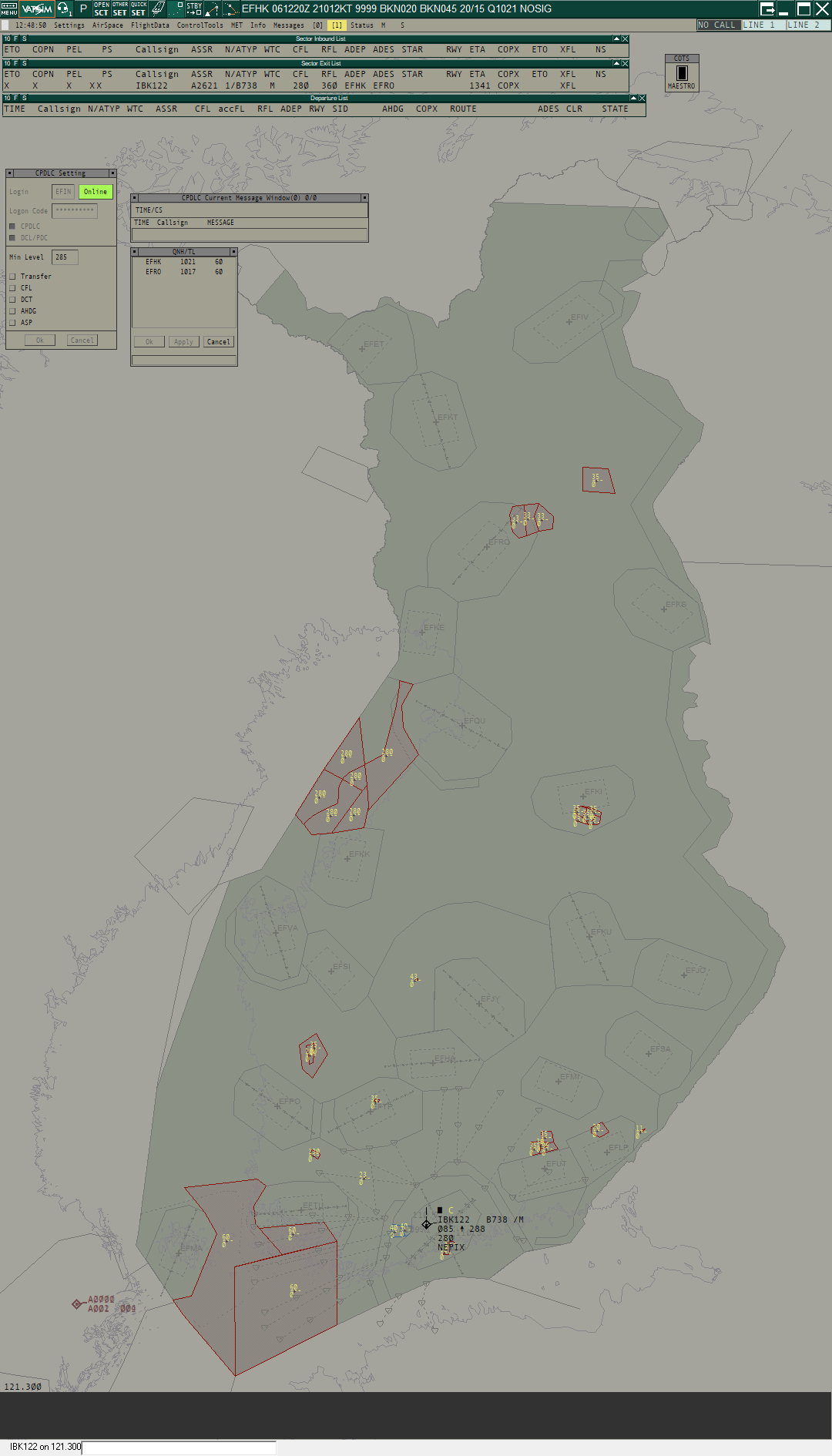 Finnish airspace in Euroscope